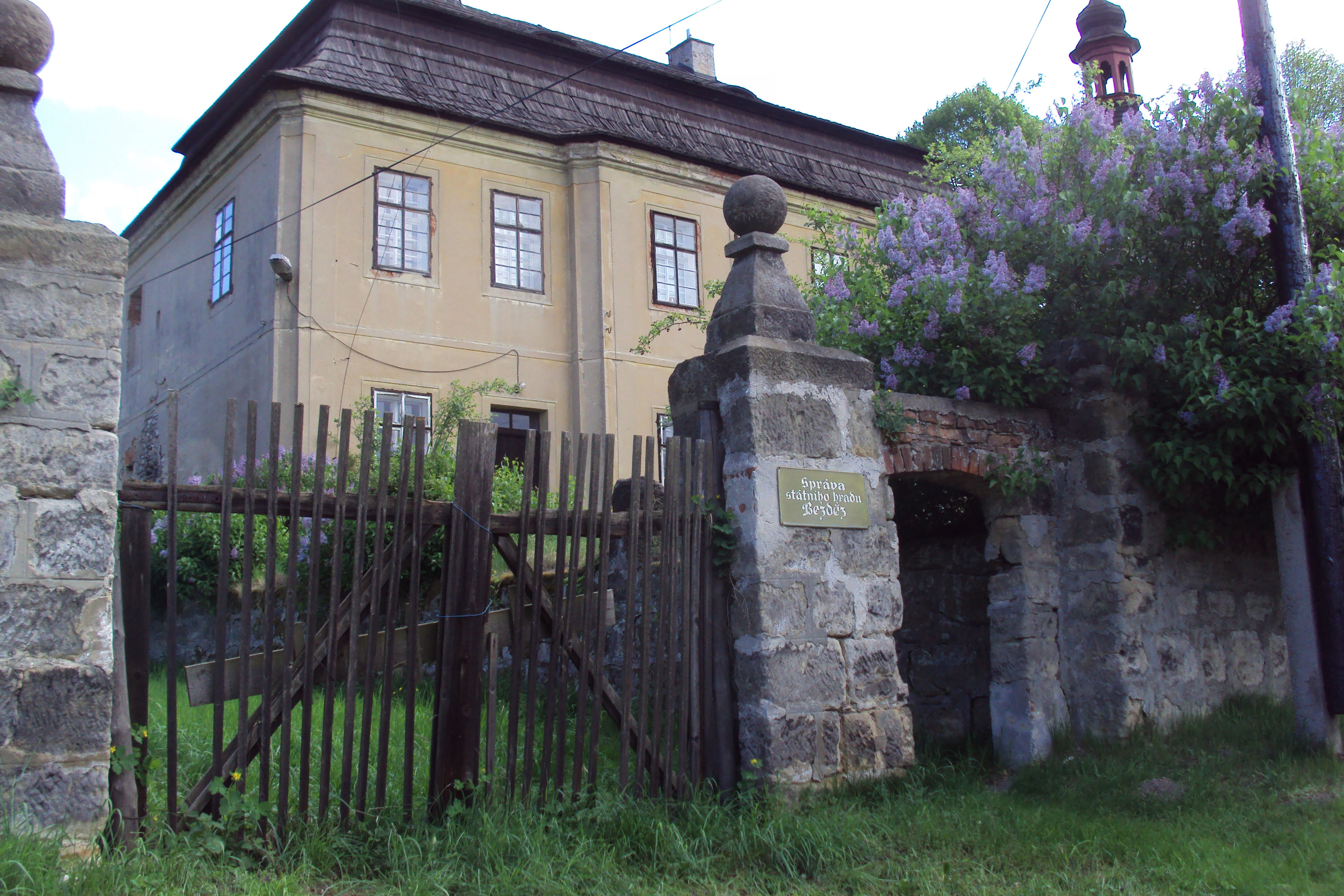 Budova fary v obci Bezděz, dnes Správa hradu